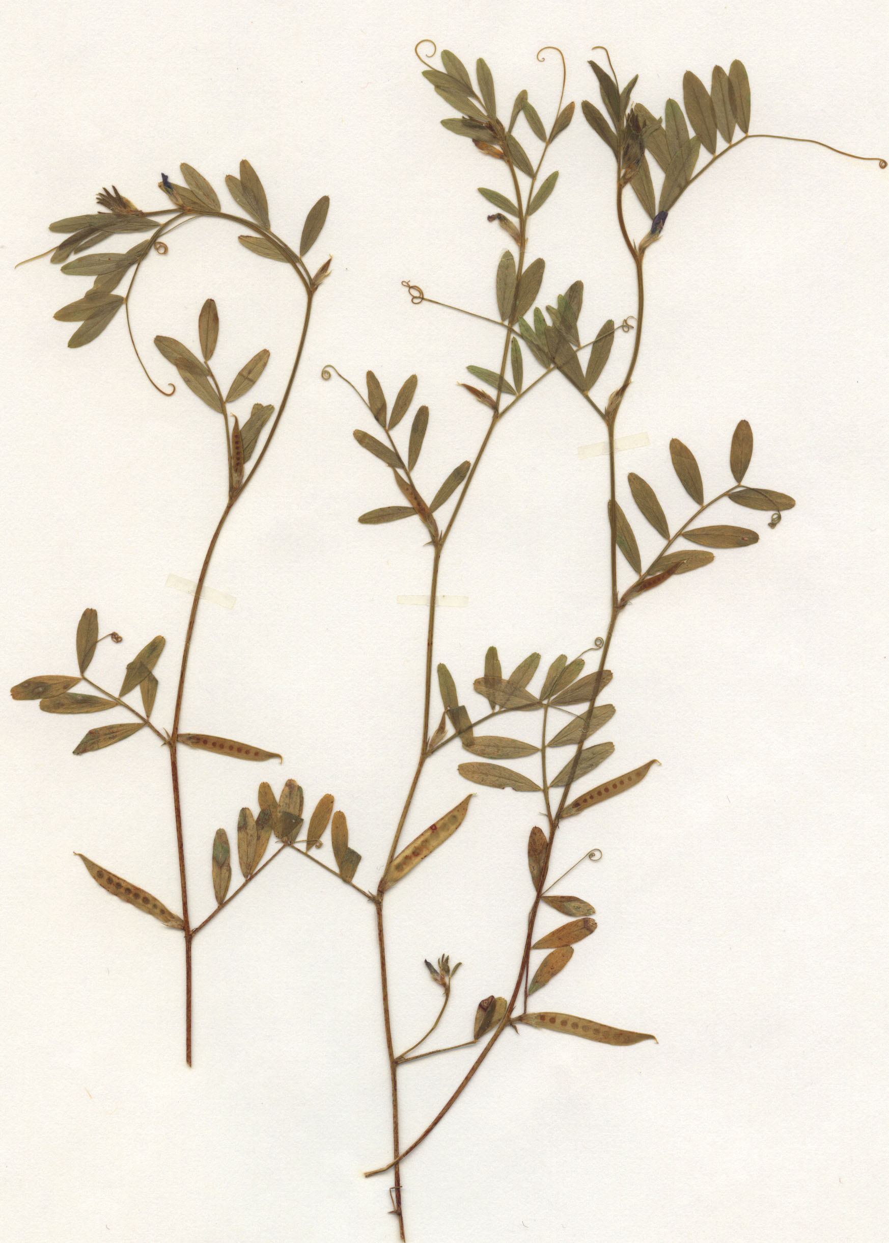 Vicia lathyroides, eigener Herbarbeleg